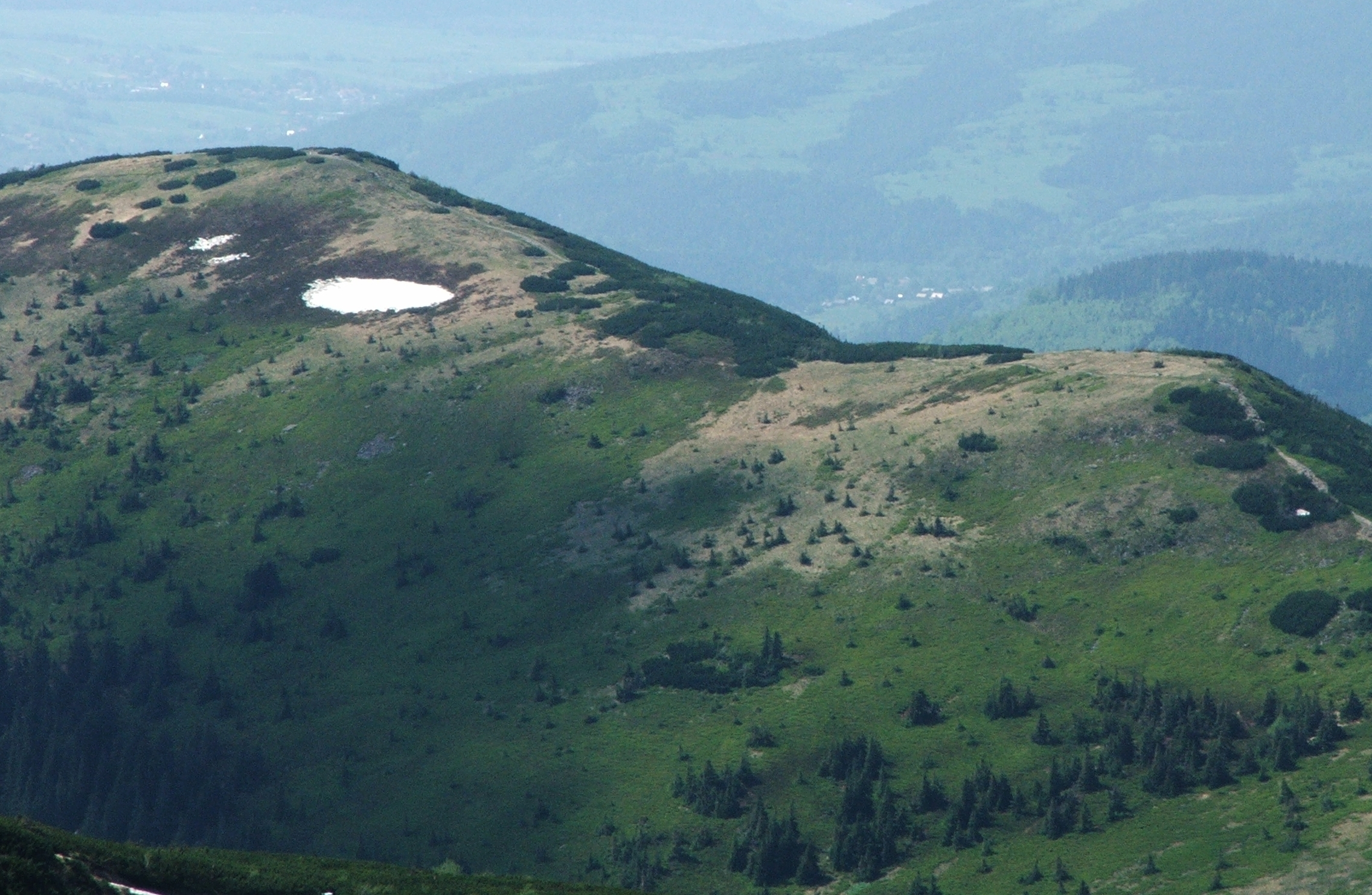 Widok z Babiej Góry na Małą Babią Górę